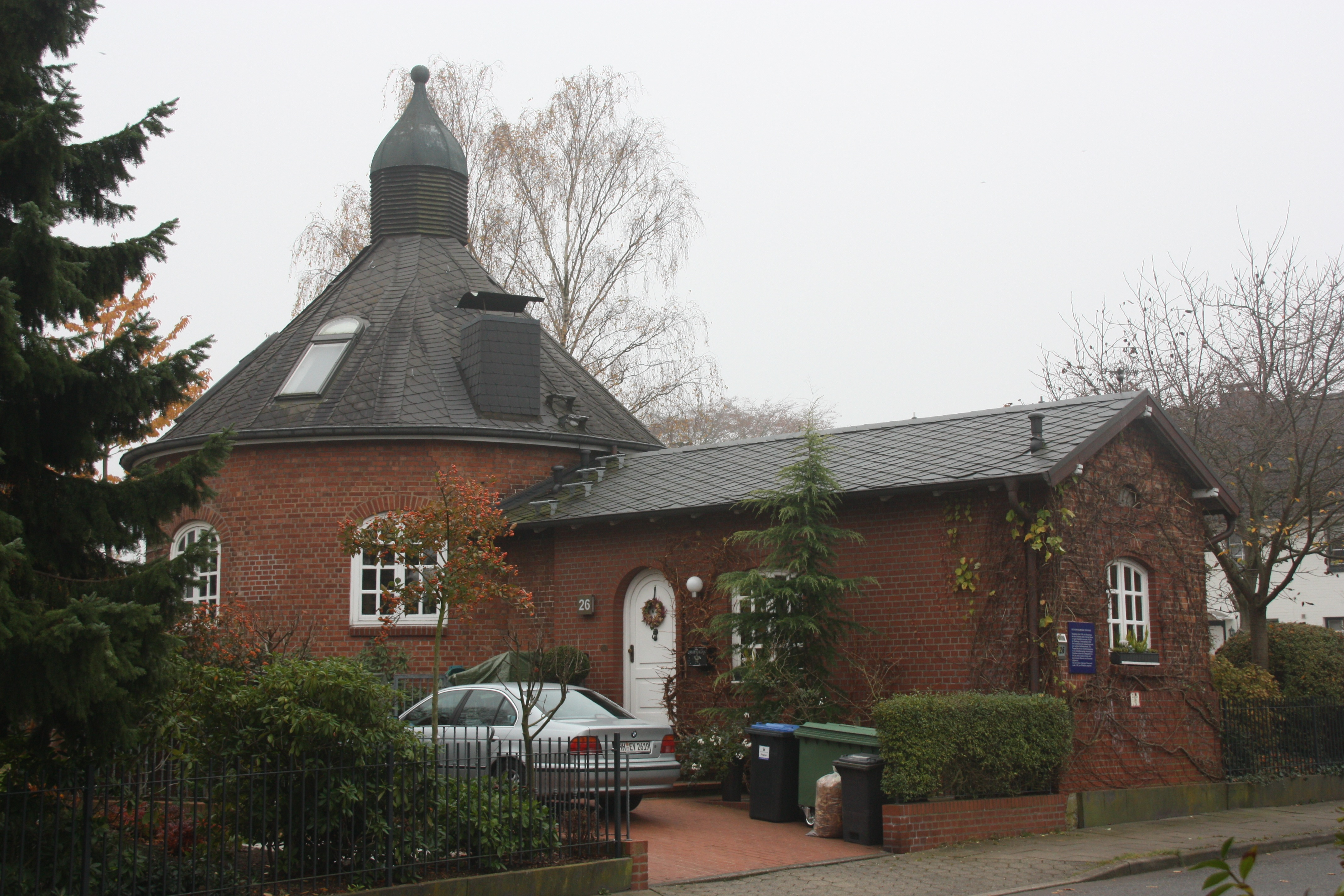 Hamburg, ehemaliges Grundwasserwerk in Tonndorf This is a photograph of an architectural monument.